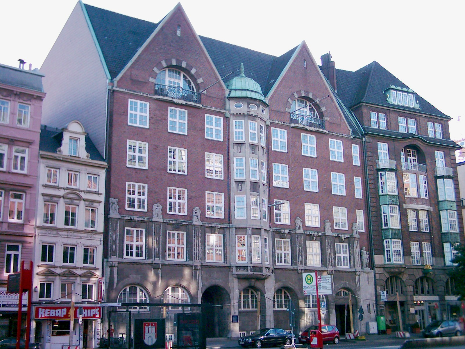 Hamburg, Dammtorstraße 25, die 1911-1913 erbaute ehemalige Oberschulbehörde. Architekt war Fritz Schumacher. This is a photograph of an architectural monument. Siehe auch / See also Image:Hamburg Ehemalige Oberschulbehörde 02.jpg Image:Hamburg Ehemalige Oberschulbehörde Tafel 02.jpg